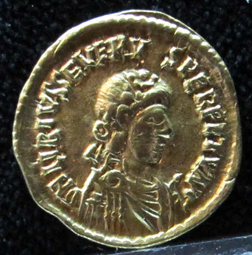 Tesoretto di Sovana, solidi d'oro, V secolo